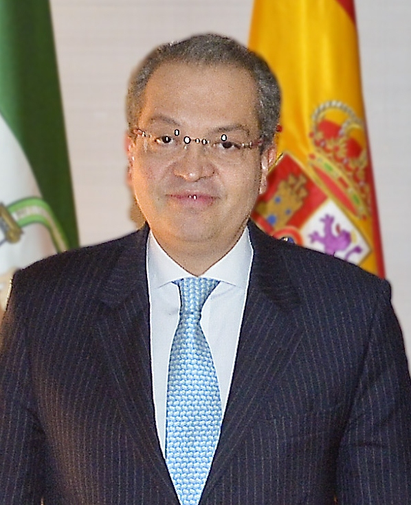 14.12.15-Embajador y Cónsul de Colombia